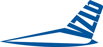 logo vzlu